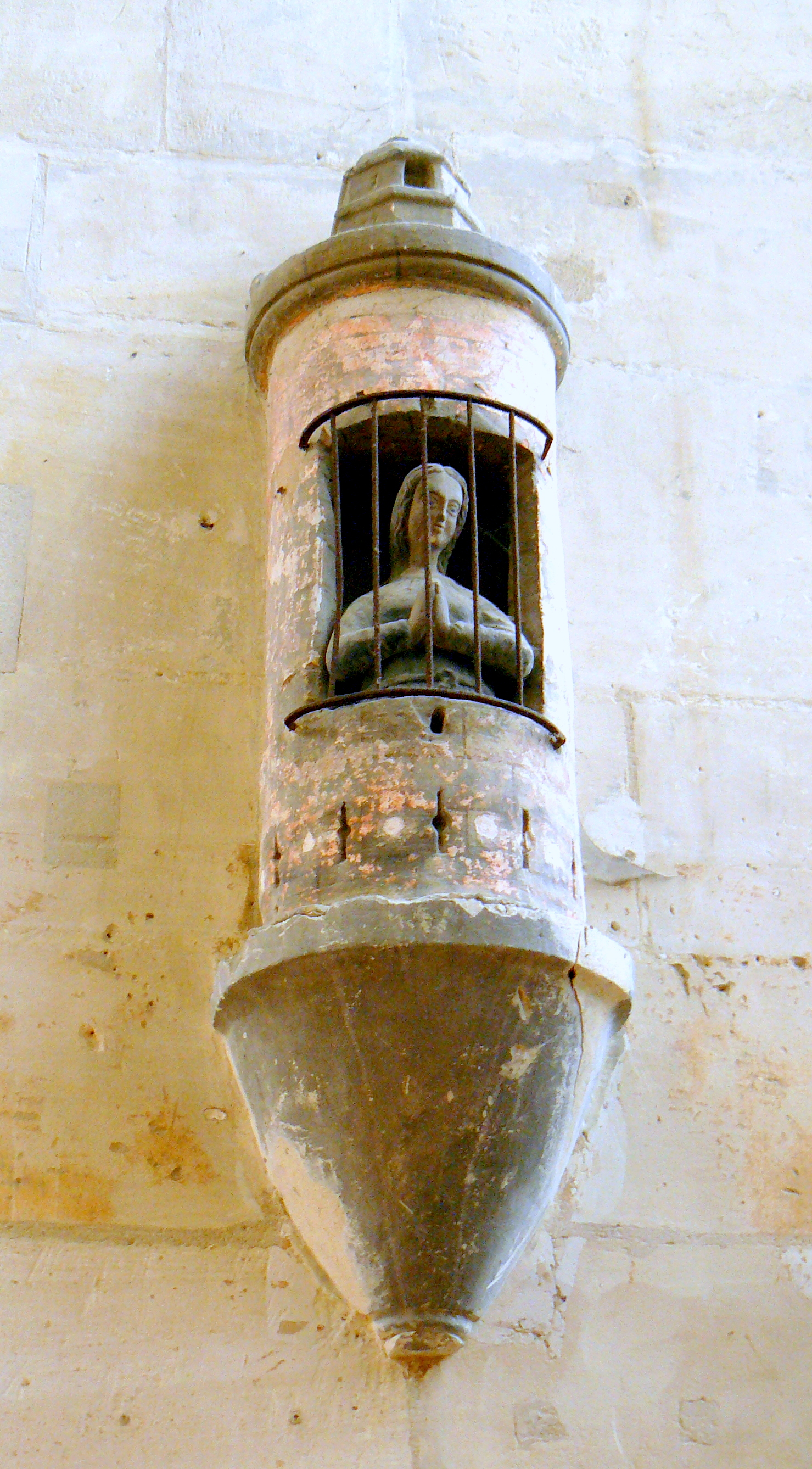 Sainte Barbe dans sa tour. Collégiale Saint-Gervais Saint-Protais, Gisors, Eure, France.